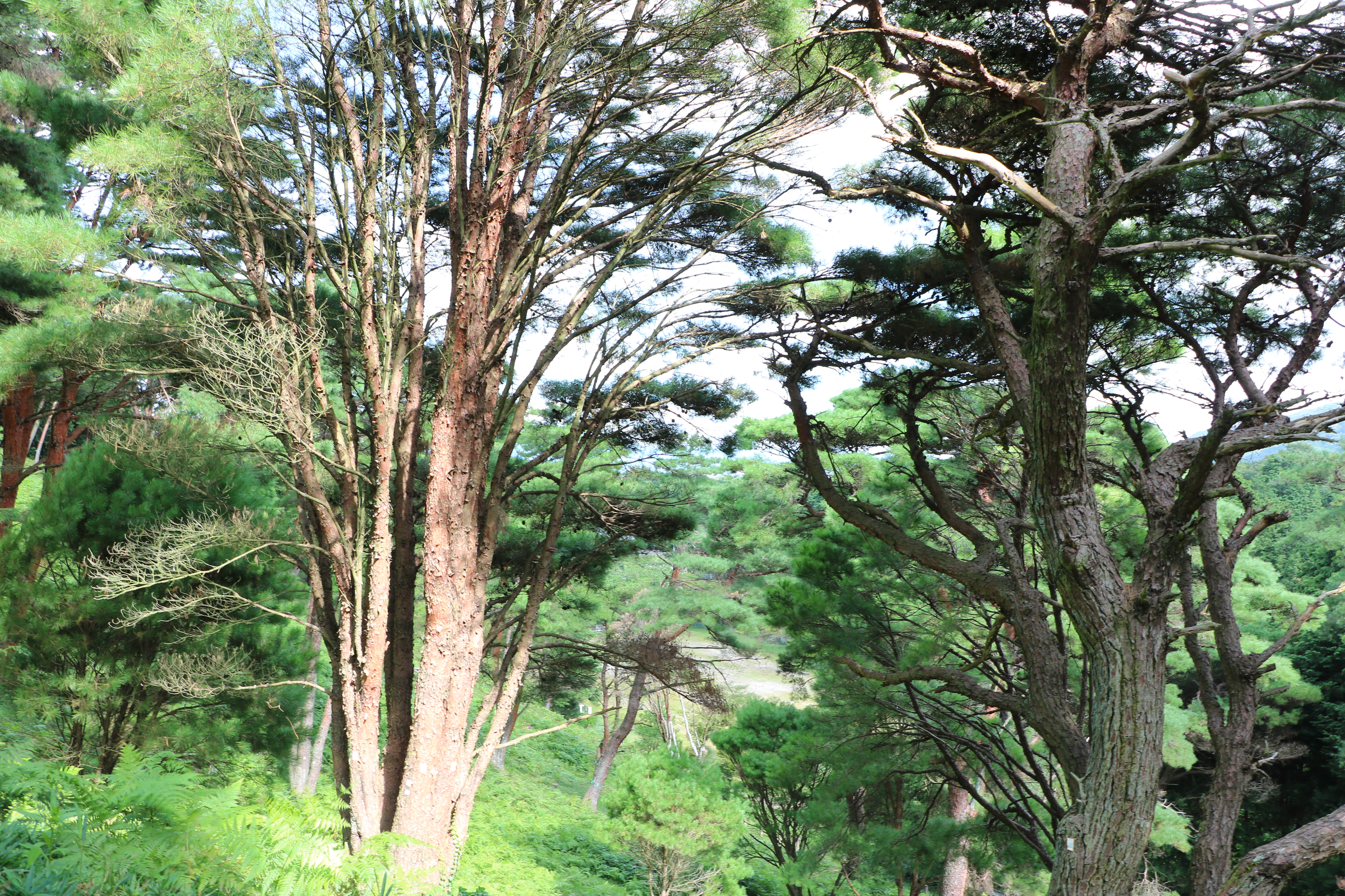 平松のウツクシマツ自生地（国指定天然記念物、滋賀県湖南市）